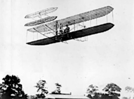 Wrighték tökéletesített repülŒgépe, a Flyer 2-es